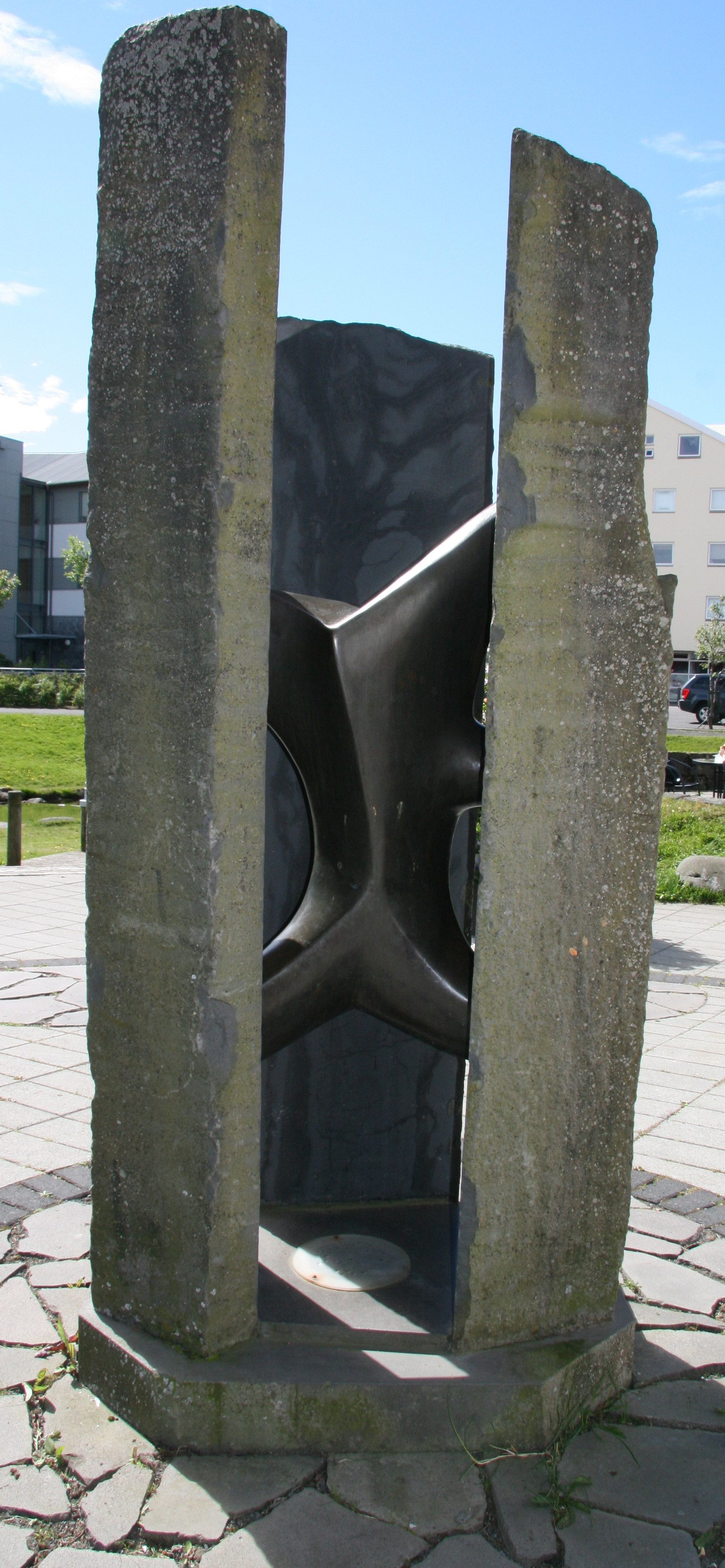 Úr fjötrum